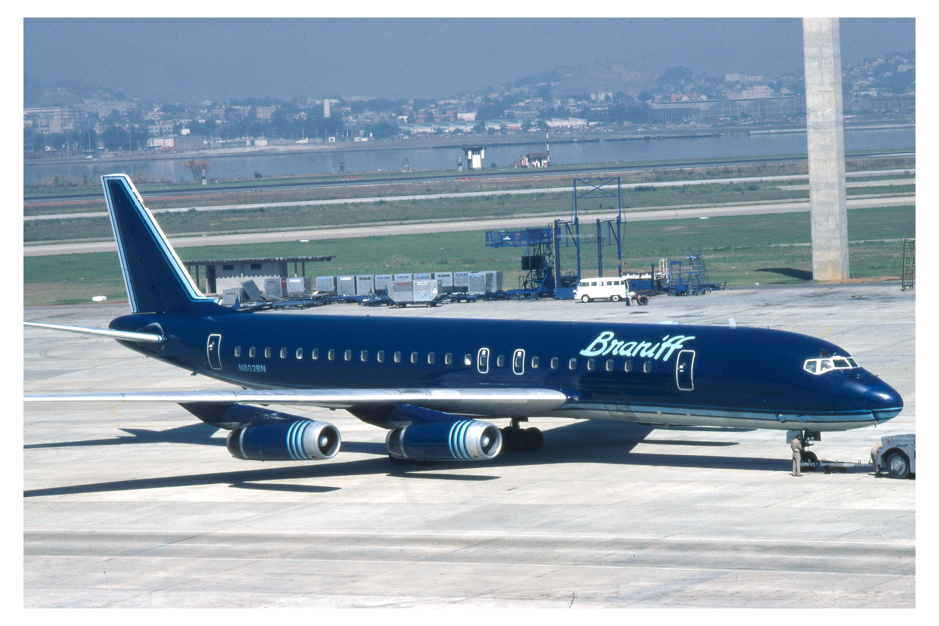 Rio 1980.